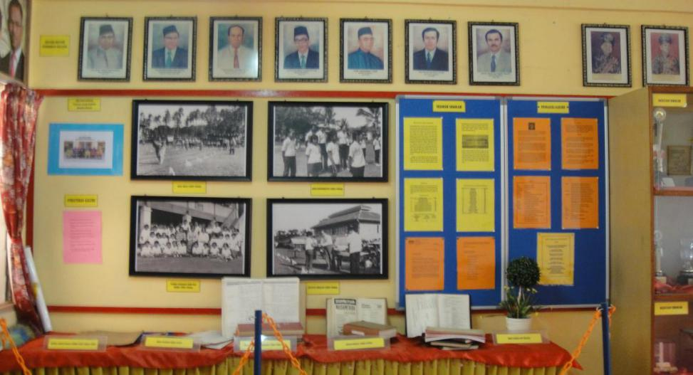 Gambar di dalam Galeri Sejarah